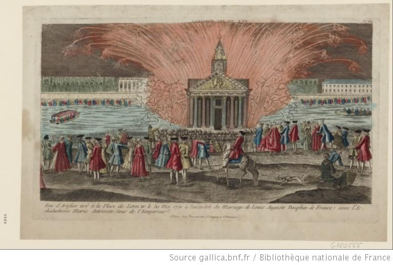 Feu d'artifice tiré à la place de Louis XV le 30 mai 1770, à l'occasion du mariage de Louis Auguste Dauphin de France avec l'archiduchesse Marie Antoinette, soeur de l'empereur, Imprimé à Paris chez Basset, rue S.t-Jacques à S.e-Geneviève